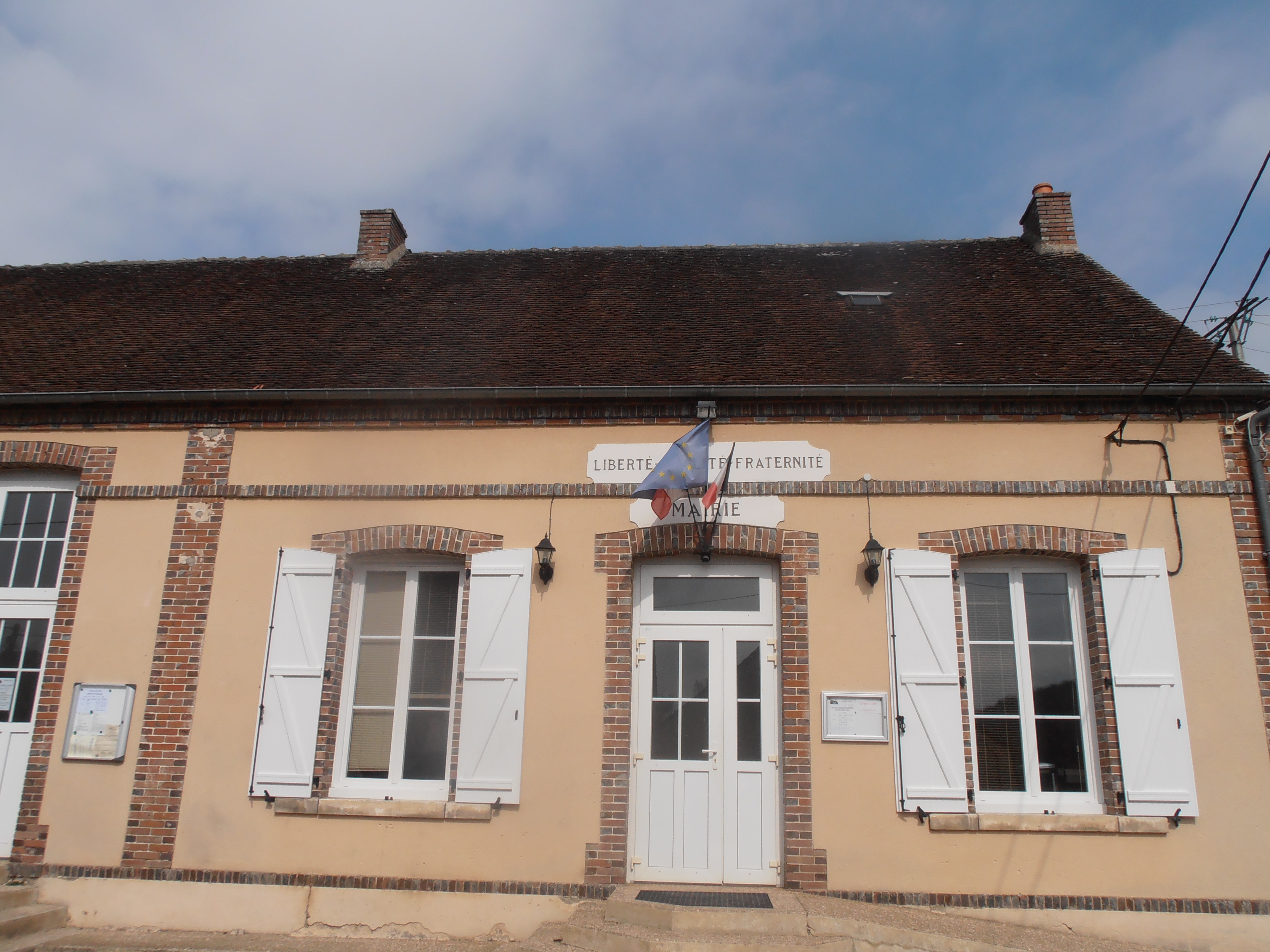 Mairie de Verlin (Yonne) France